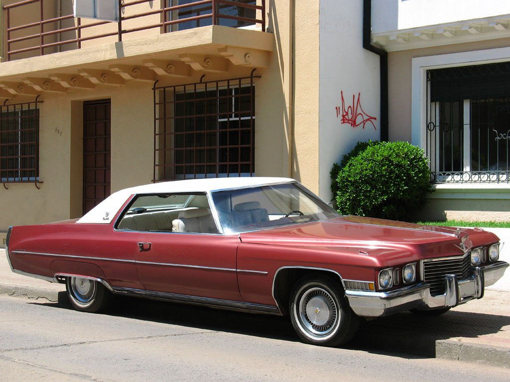 Cadillac Coupe de Ville 1972